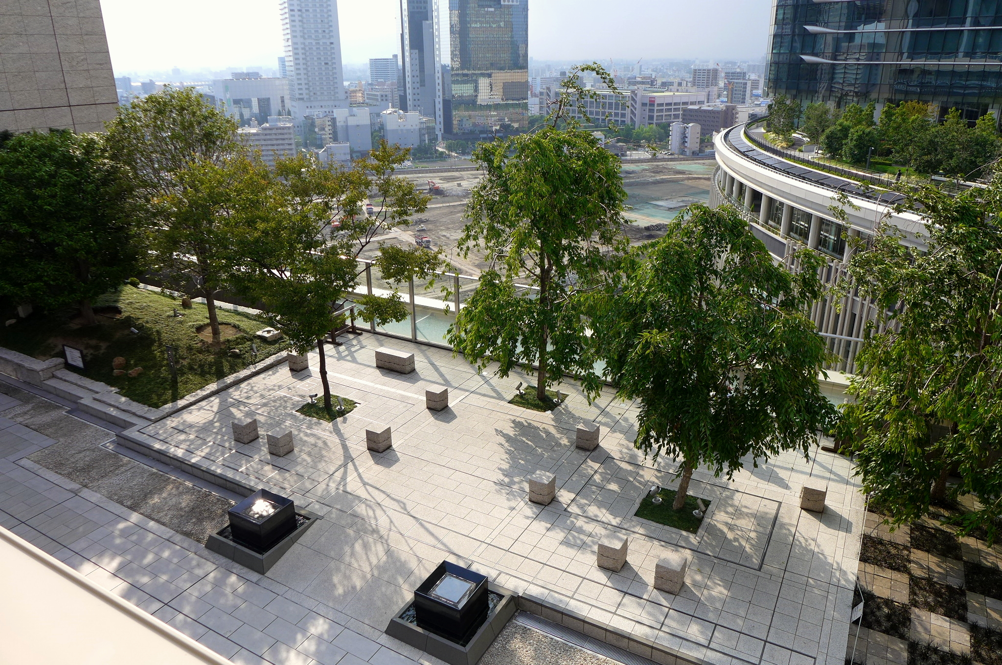 Osaka Station City Yawaragi-no-niwa_Garden